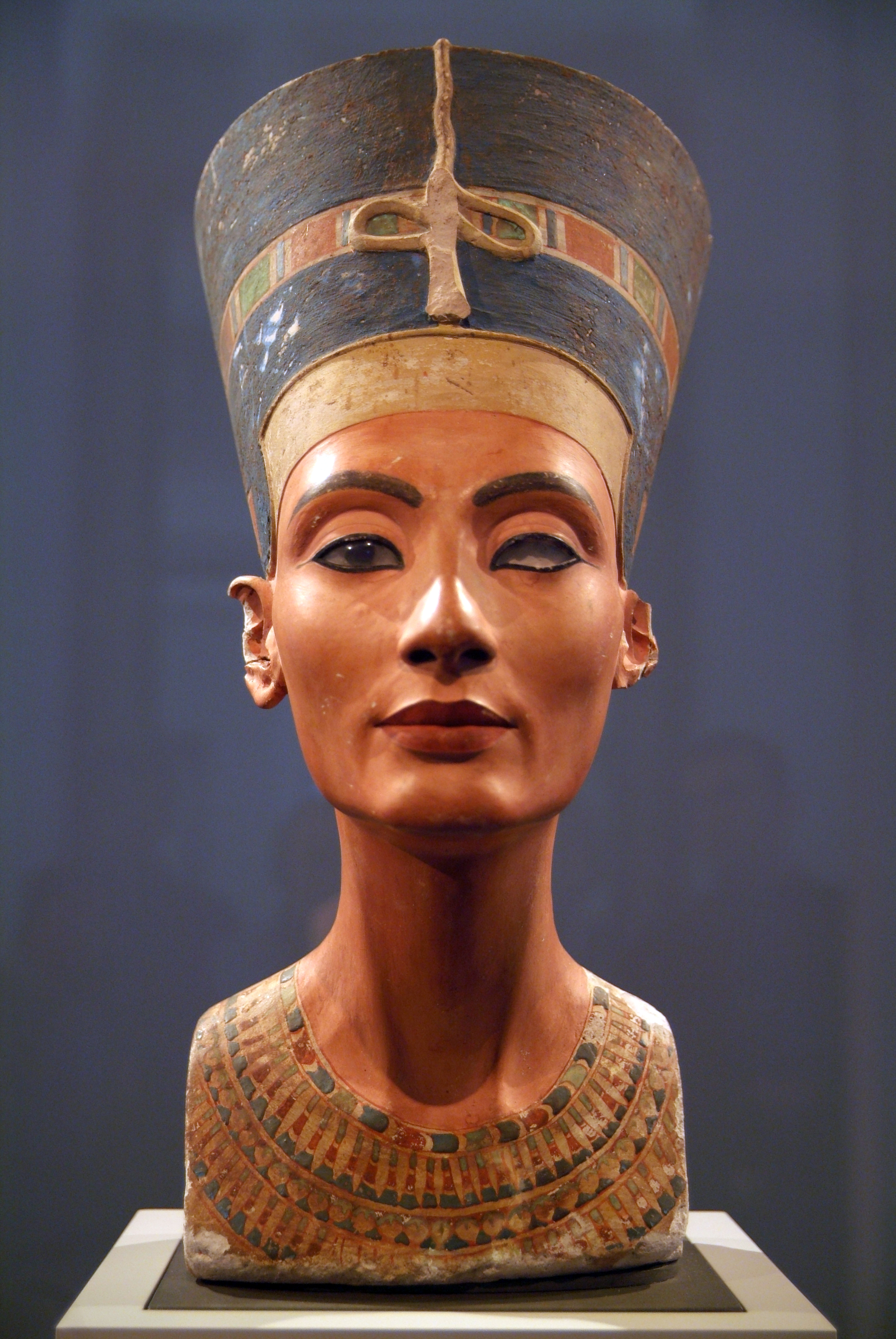 Nefertiti (Nofretete in Berlin)